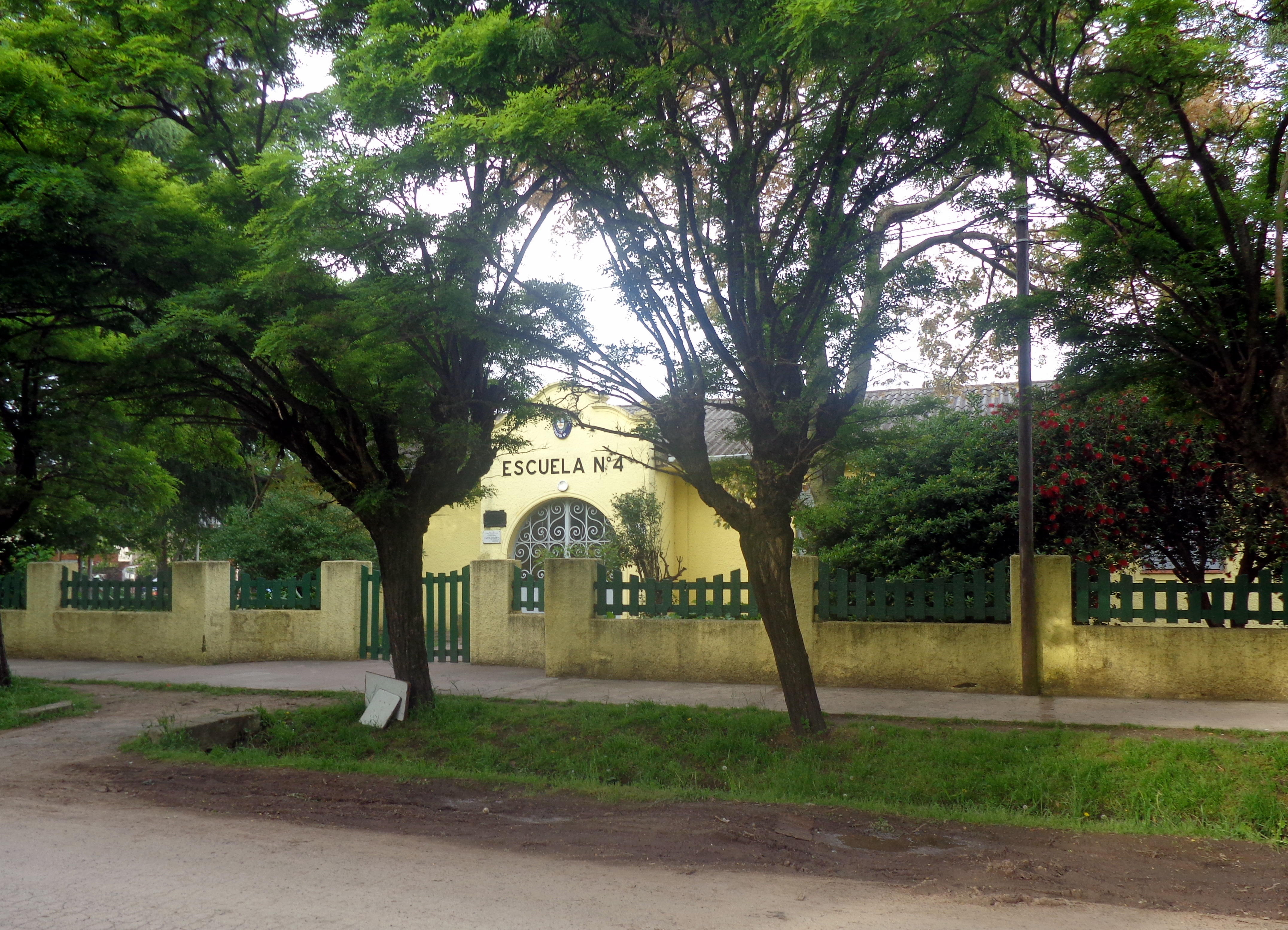 Cortines o Cortinez en el partido de Luján, provincia de Buenos Aires, Argentina.